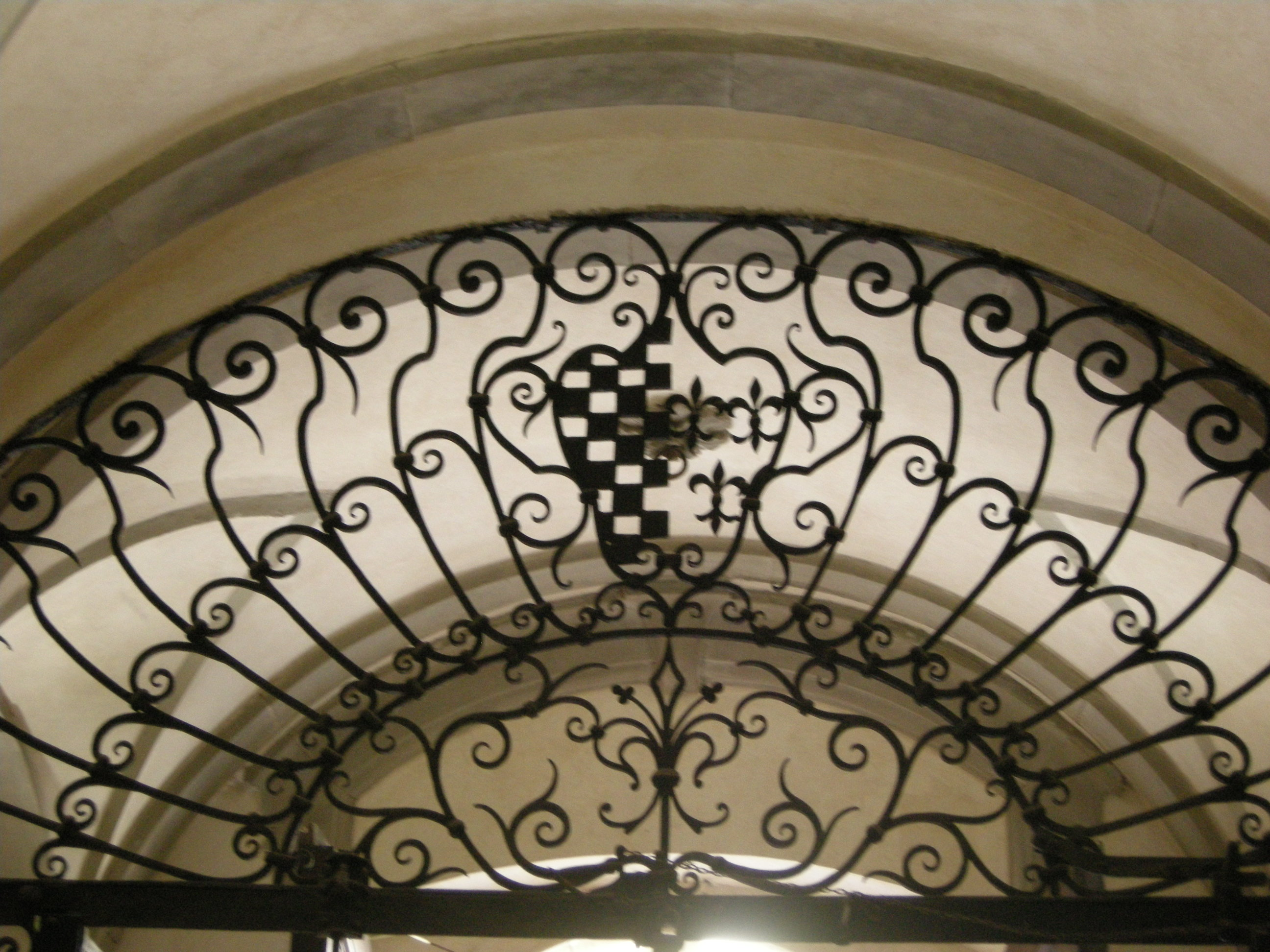 Palazzo bartolommei, androne 05 inferriata